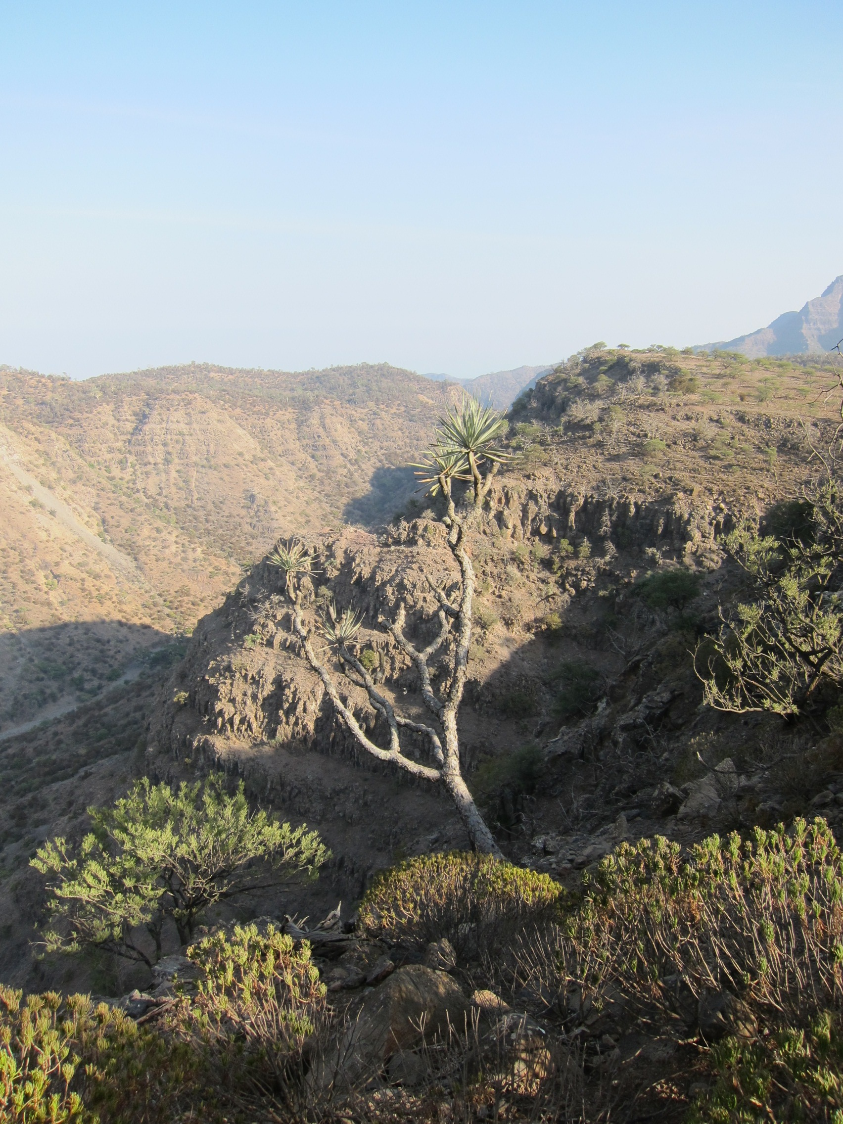 Dracaena ombet Heuglin ex Kotschy & Peyr. en bordure de la Forêt du Day, Djibouti